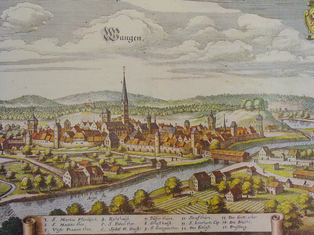 Matthäus Merian d. Ä.: Wangen im Allgäu; Topograhia Sueviae, 1643